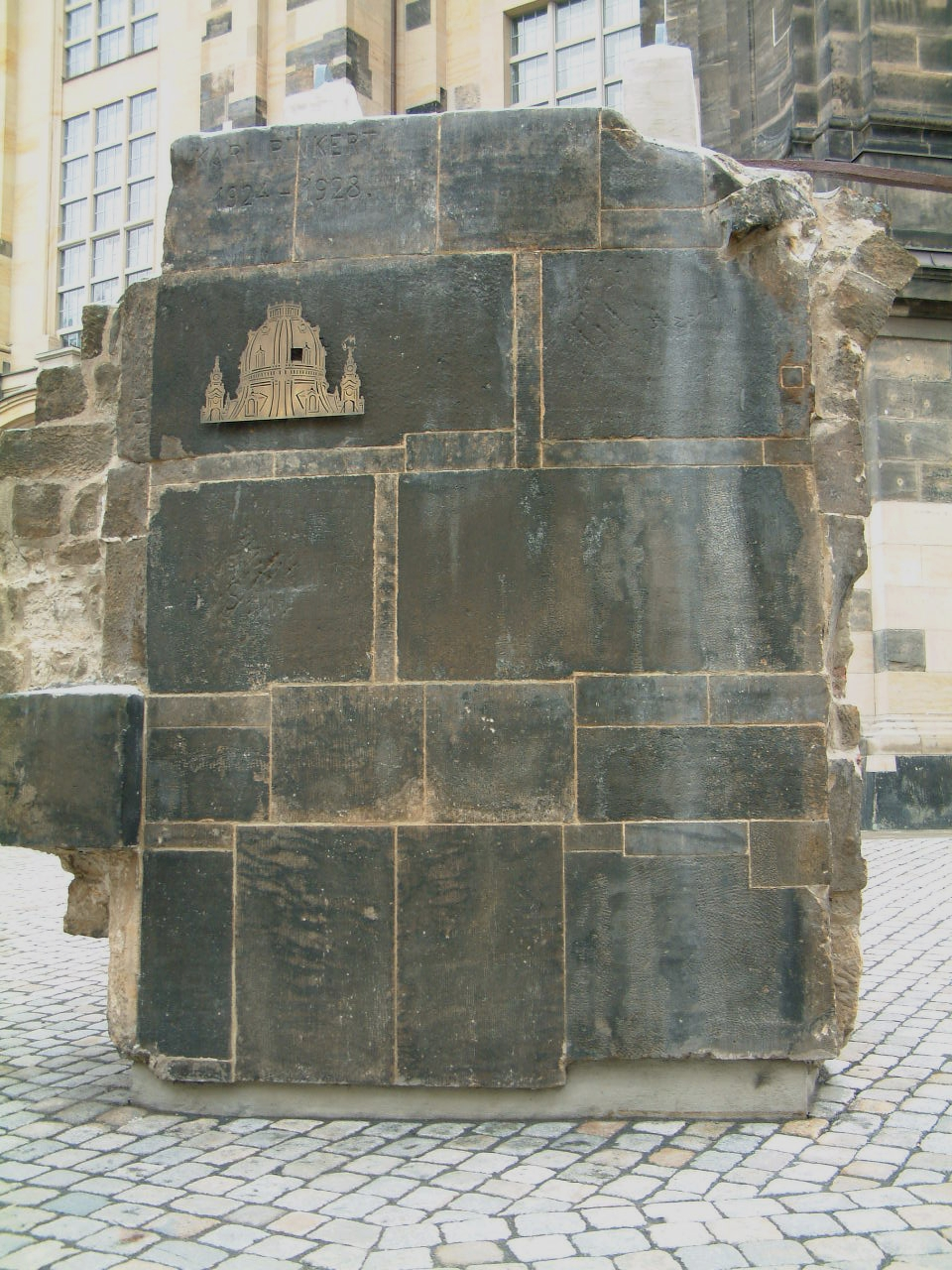 Kuppelfragment der Frauenkirche, Dresden, Sachsen, Deutschland.